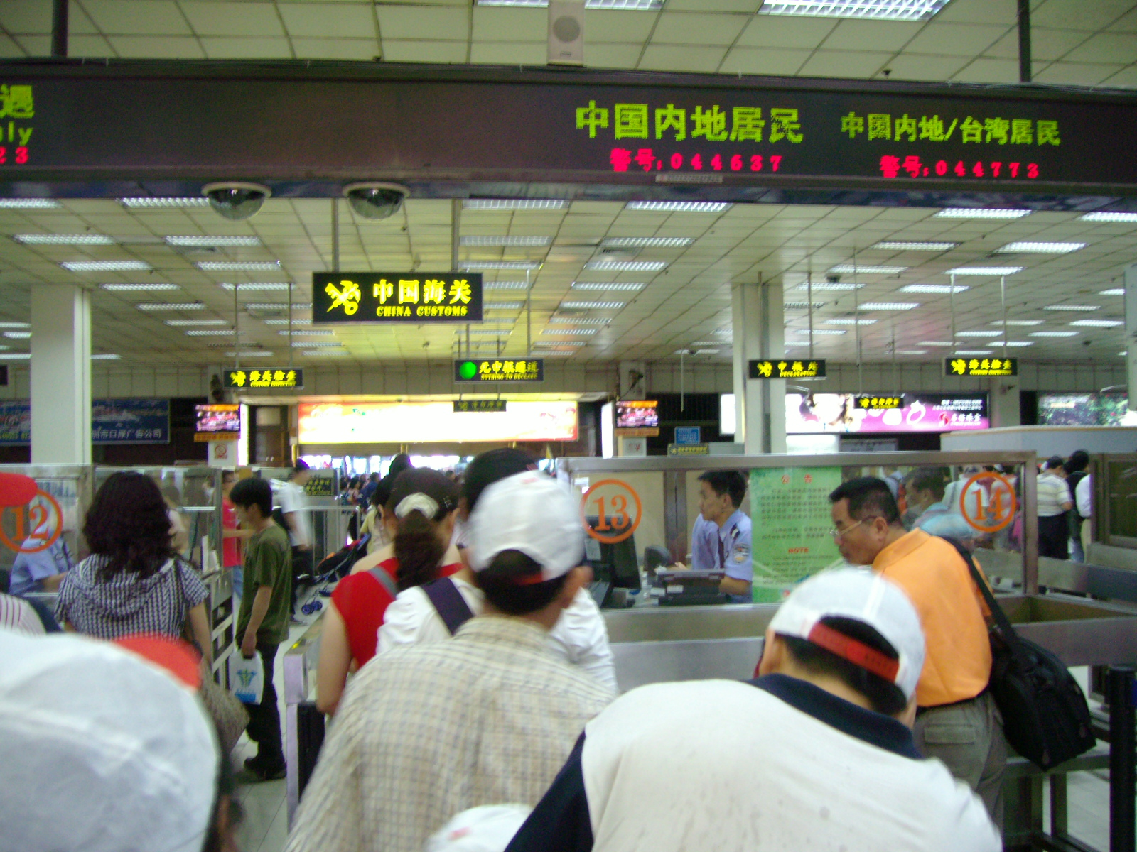 深圳皇岗口岸海关